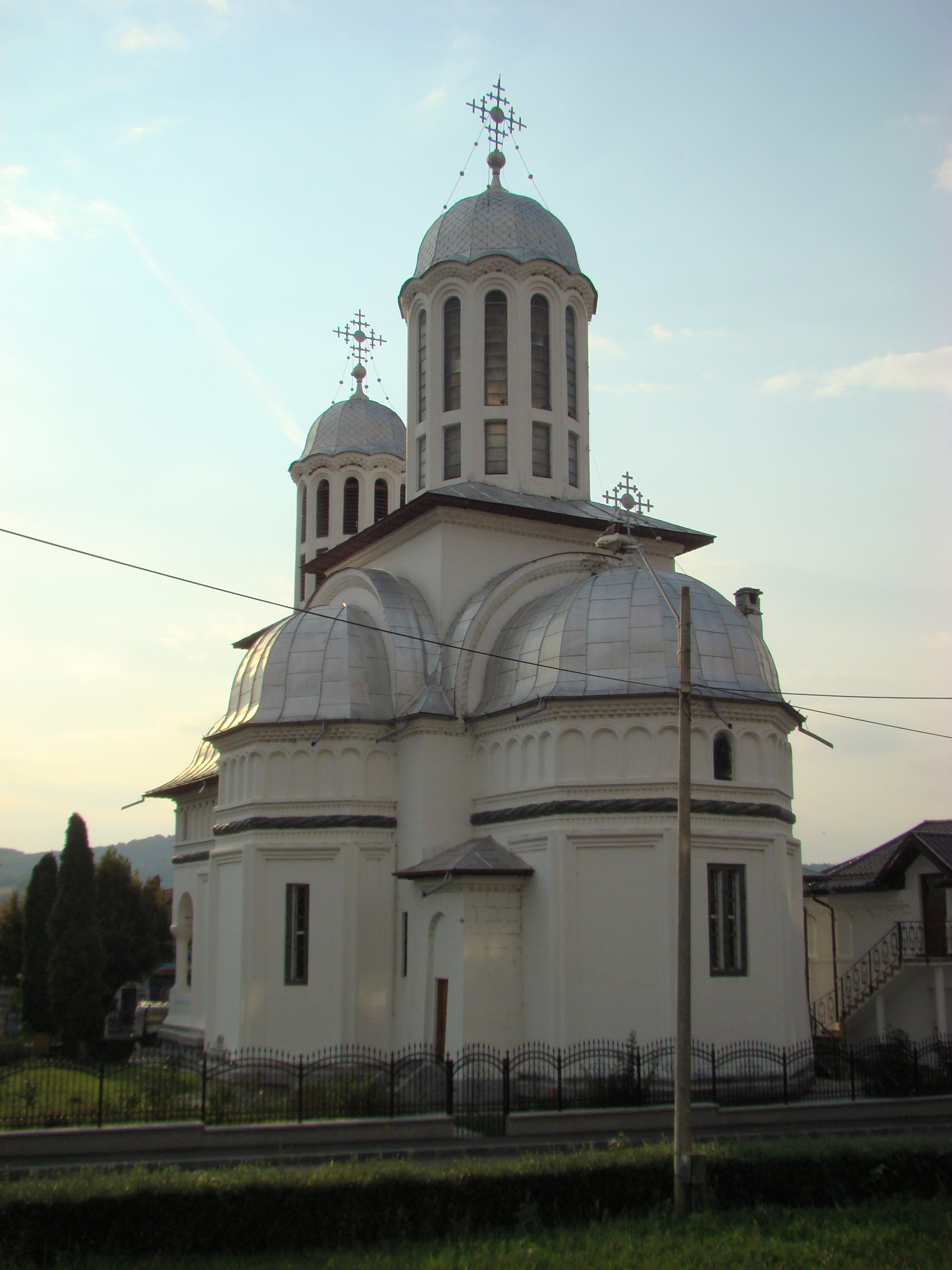 Biserica "Sf. Gheorghe", municipiul Curtea de Argeș, Bd. Basarabilor 91